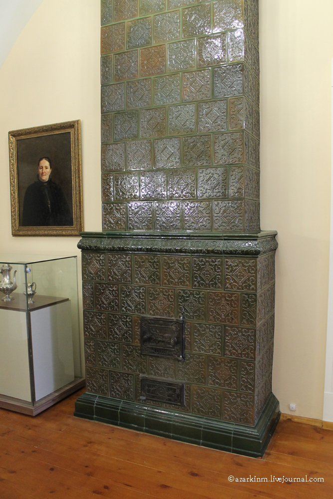 Печ. Сядзіба Пшаздзецкіх